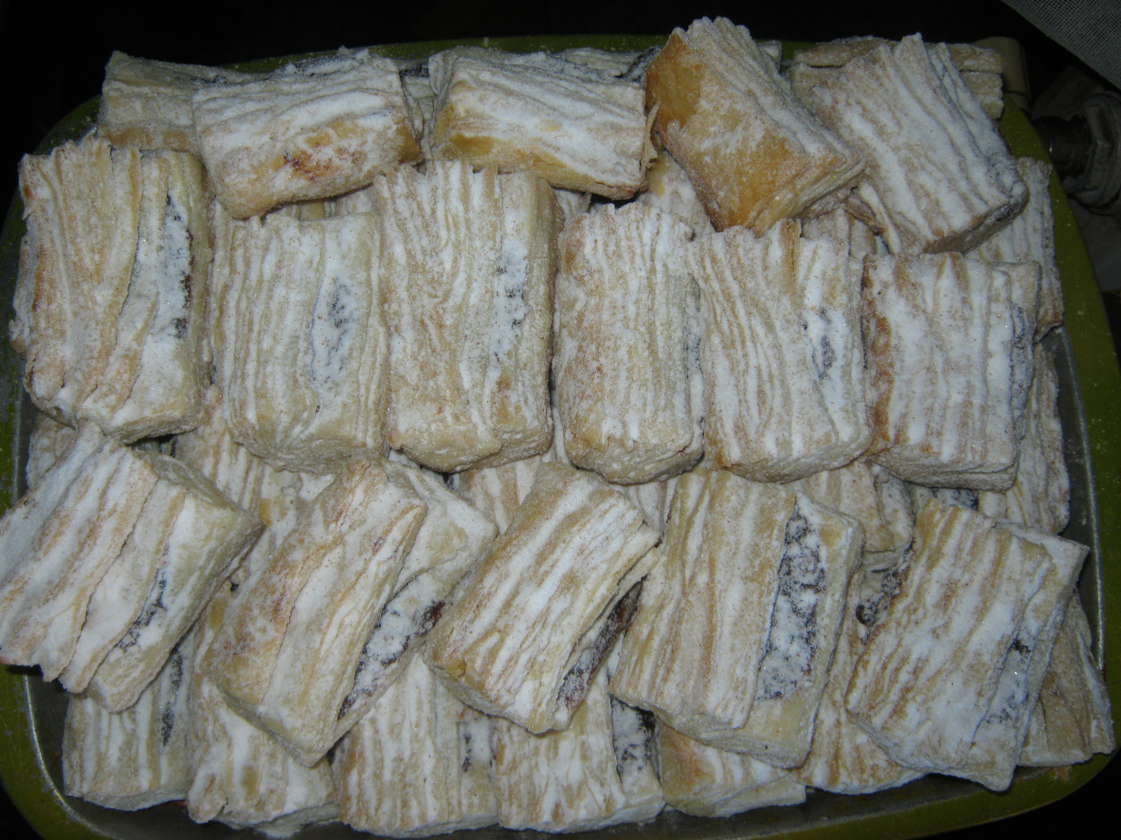 Српски (ћирилица): Једна од најлепших посластица, моја мама их спрема као нико.